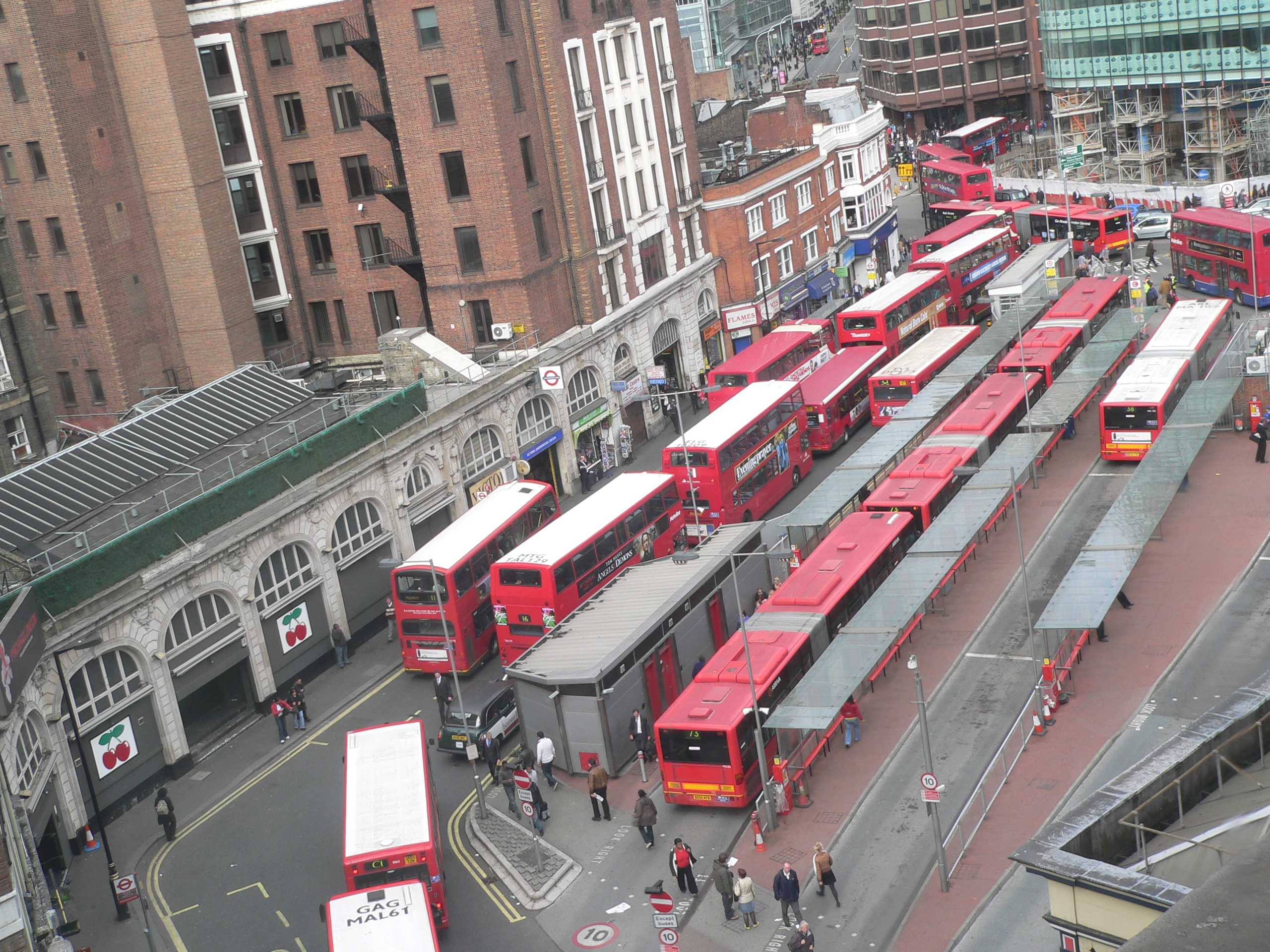 Victoria Bus Terminal